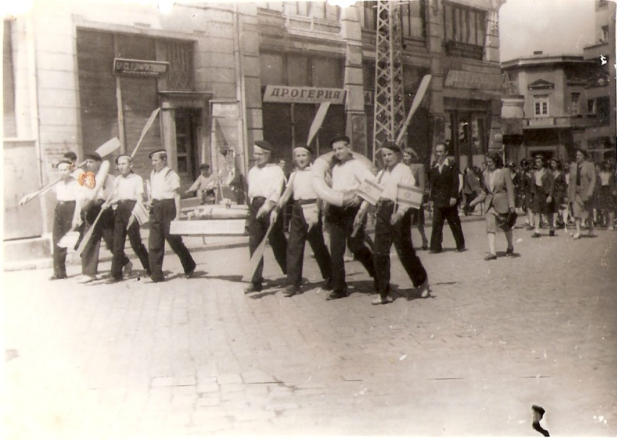 מצעד של תלמידי בית הספר היסודי היהודי בפלובדיב ב-15 במאי 1948 לרגל הכרזת מדינת ישראל. בשורה השנייה במרכז יקיר (פריסיאדו) גרטי מנהל בית הספר